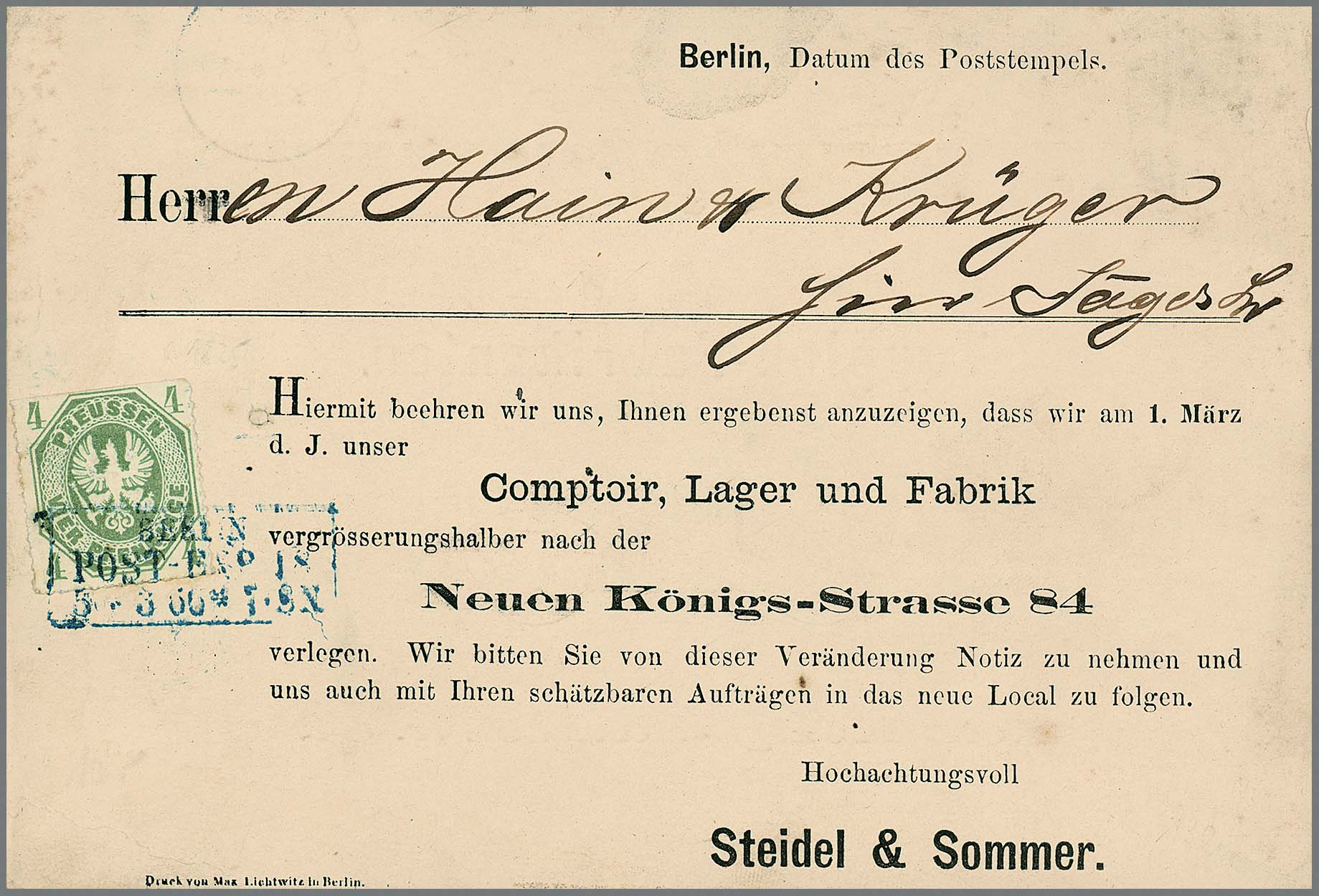 Preußische Drucksachenkarte (Vertreterkarte) von 1866